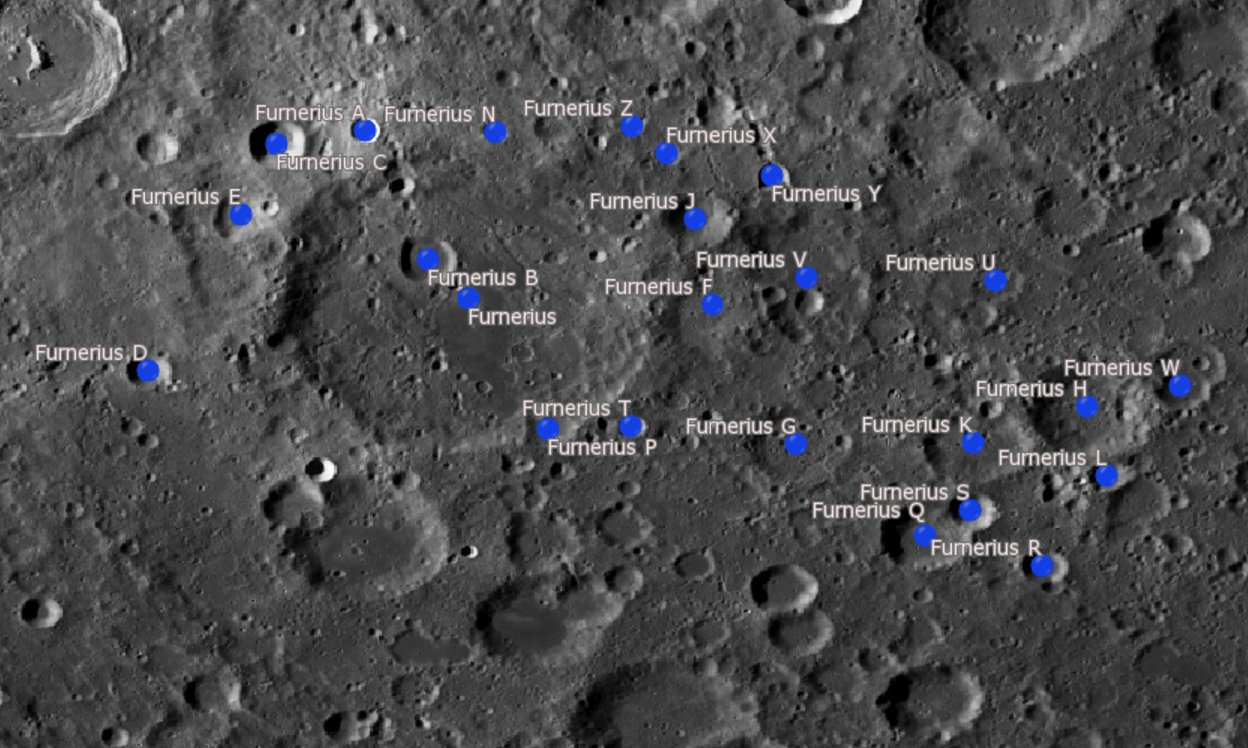 Cráter lunar Furnerius. Cráteres satélite. (Imagen LRO)